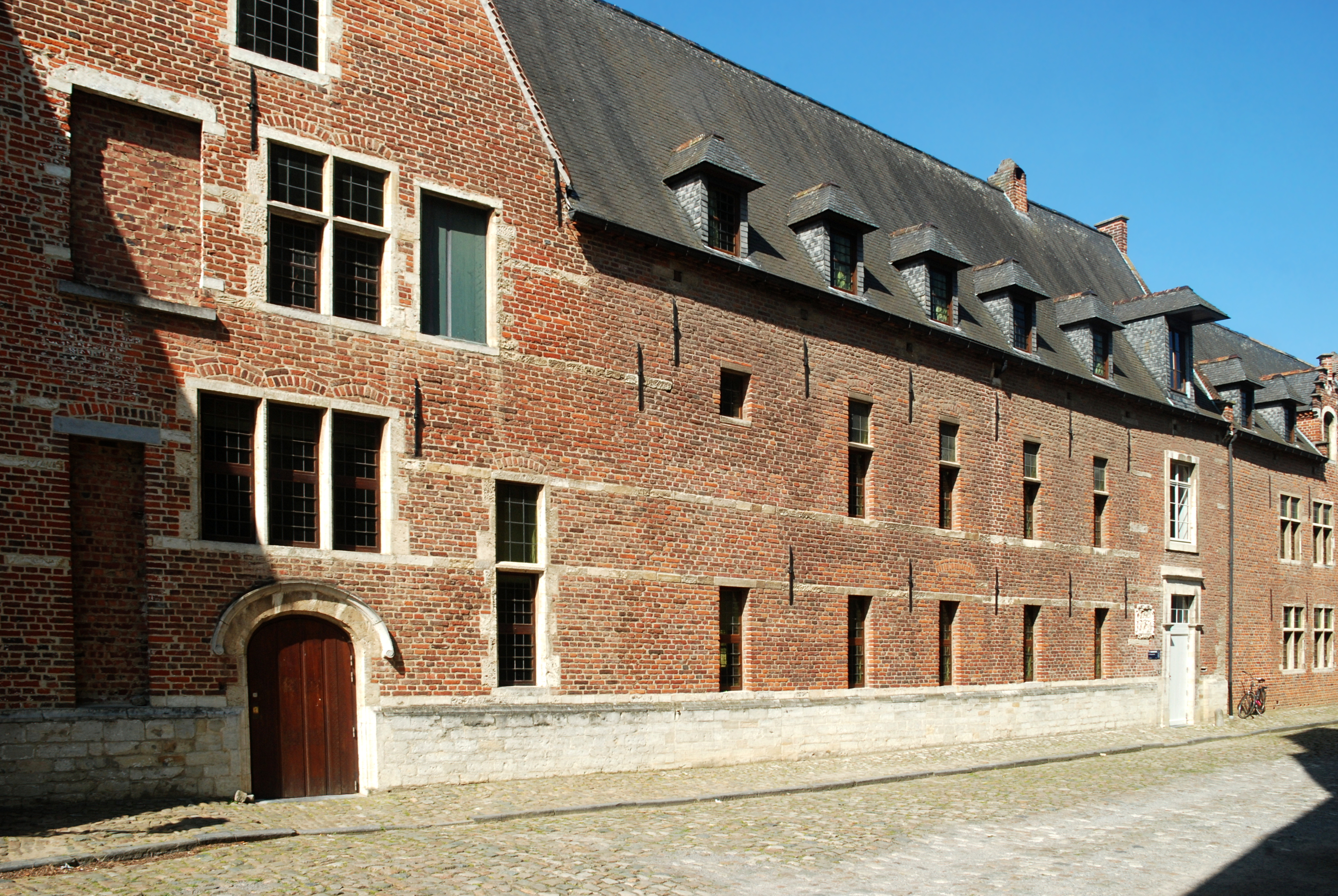 Belgium - Leuven - Groot Begijnhof - Heilige Geesttafel - Middenstraat n° 16